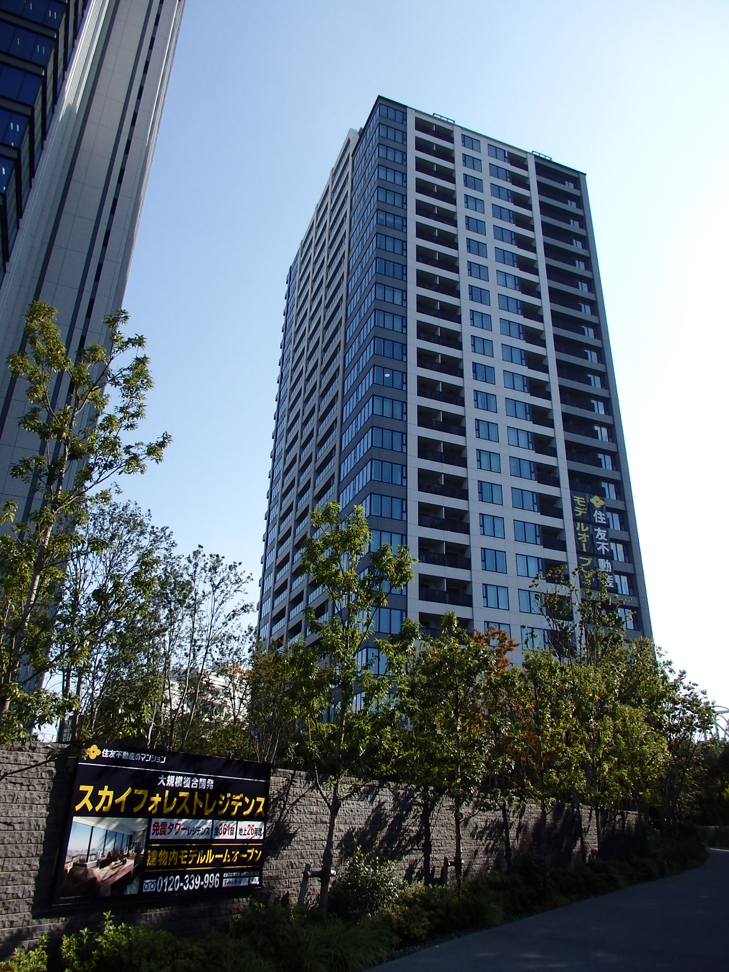 スカイフォレストレジデンス